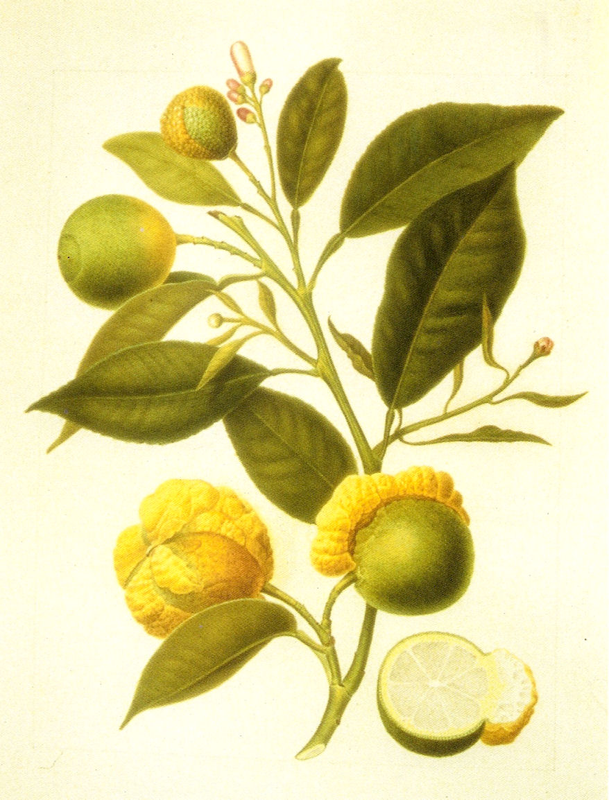 Citrus aurantium var. bizzarria, Arancio Bizzarria. Disegnato da A.Poiteau nel 1811, acquarellato da D.Del Pino nel 1821, cm 45 x 33,5